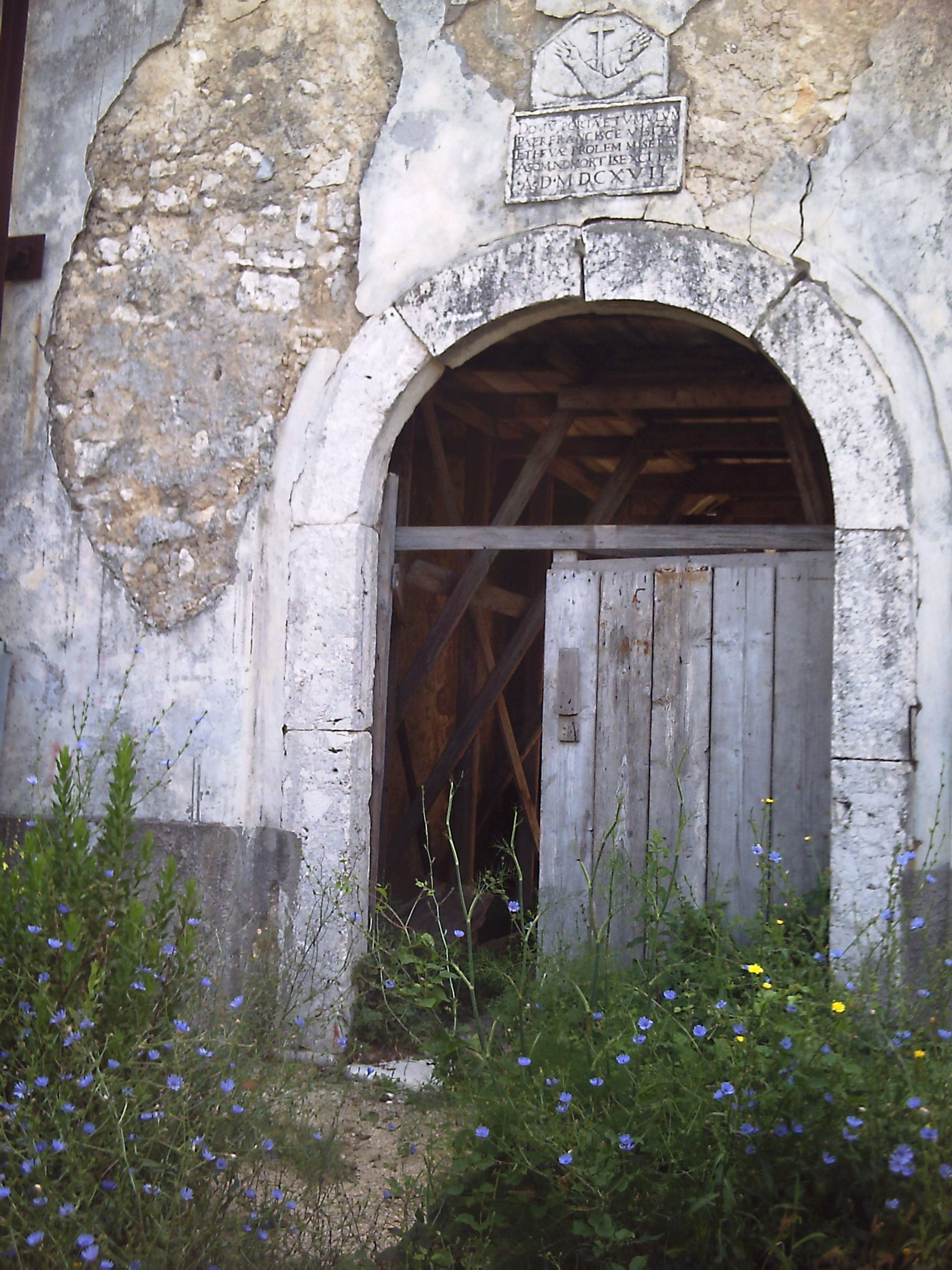 Portale di ingresso del Convento di San Francesco di Guardia Sanframondi (Bn)